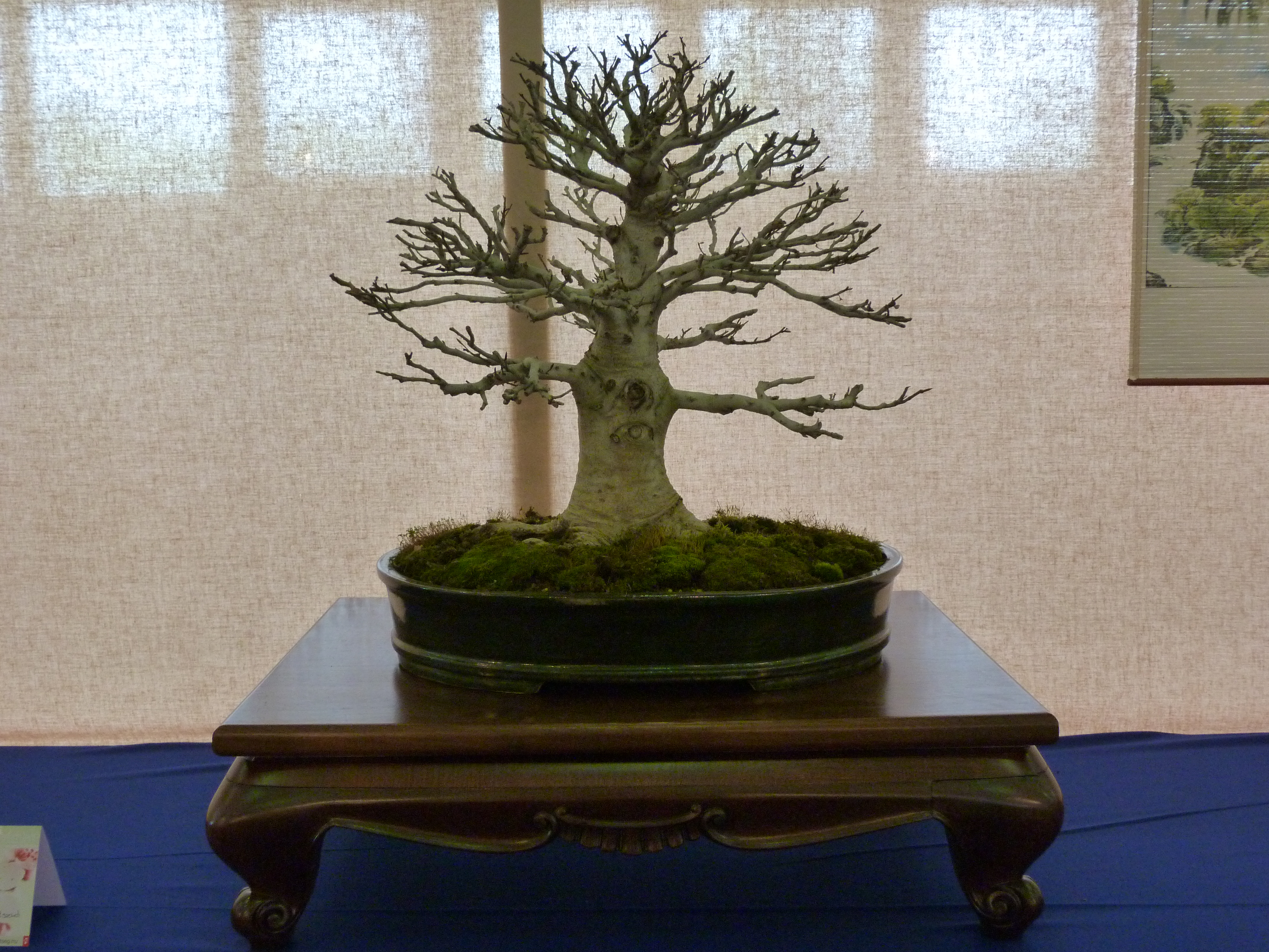 A felvétel 2015. április 17-én pénteken készült Budapesten. Construma Kert. A Magyar Bonsai Szövetség kiállítása. 1. Olajfa, latin neve: Olea Europea, eredete: Yamadori, tulajdonos/alakította: Bartusek László 2. Keskenylevelű fagyal, Ligustrum Ovalifolium, Yamadori, Baumann Attila 3. Kocsányos tölgy, Quercus Robur, Yamadori, Néder András 4. Hárs, Tilia Cordata, Yamadori, Bartusek László 5. Japán fekete fenyő, Pinus Thunbergi, Import, Bartusek László 6. Japán juhar, Acer Palmatum, Import, Bartusek László 7. Háromerű juhar, Acer Buergerianum, Import, Bartusek László 8. Japán ciprus, Criptomeria Japonica, Import, Bartusek László 9. Fehér bükk, Fagus Crenata, Import, Bartusek László 10. Japán juhar, Acer Palmatum, Import, Bartusek László 11. Háromerű juhar, Acer Buergerianum, Import, Bakon Pál 12. Kínai boróka, Juniperus Chinensis, Import, Bakon Pál 13. Japán birs, Pseudosydonia Japonica, Import, Bakon Pál 14.Mezei juhar, Acer Campestre, Yamadori, Bakon Pál 15. Madárbirs, Cotoneaster Horizonria, Faiskola, Baumann Attila 16. Japán fehér fenyő, Pinus Parvaflora, Import, Deutsch Károly 17. Erdei fenyő, Pinus Sylvestris, Yamadori, Czégel Richárd 18. Gyertyán erdő, Carpinus Betulus, Yamadori, Czégel Richárd 19. Vadgesztenye, Aesculus Hypocastanum, Yamadori, Czégel Richárd Cimkék: Magyar Bonsai Szövetség bonsai Források: Magyar Bonsai Szövetség magyarbonsaiszovetseg.hu ©© Derzsi Elekes Andor, Budapest, 2015, A fénykép másolását és felhasználását a szerző ellenérték nélkül megengedi. Az engedély kiterjed a kereskedelmi célú hasznosításra is. Kéri azonban nevének feltüntetését a felhasználás során. A Metapolisz sorozat valamennyi képe és filmje Creative Commons alatti. kereskedelmi - for profit - célra is felhasználható. Ajánlott hivatkozás: Derzsi Elekes Andor: Metapolisz DVD line